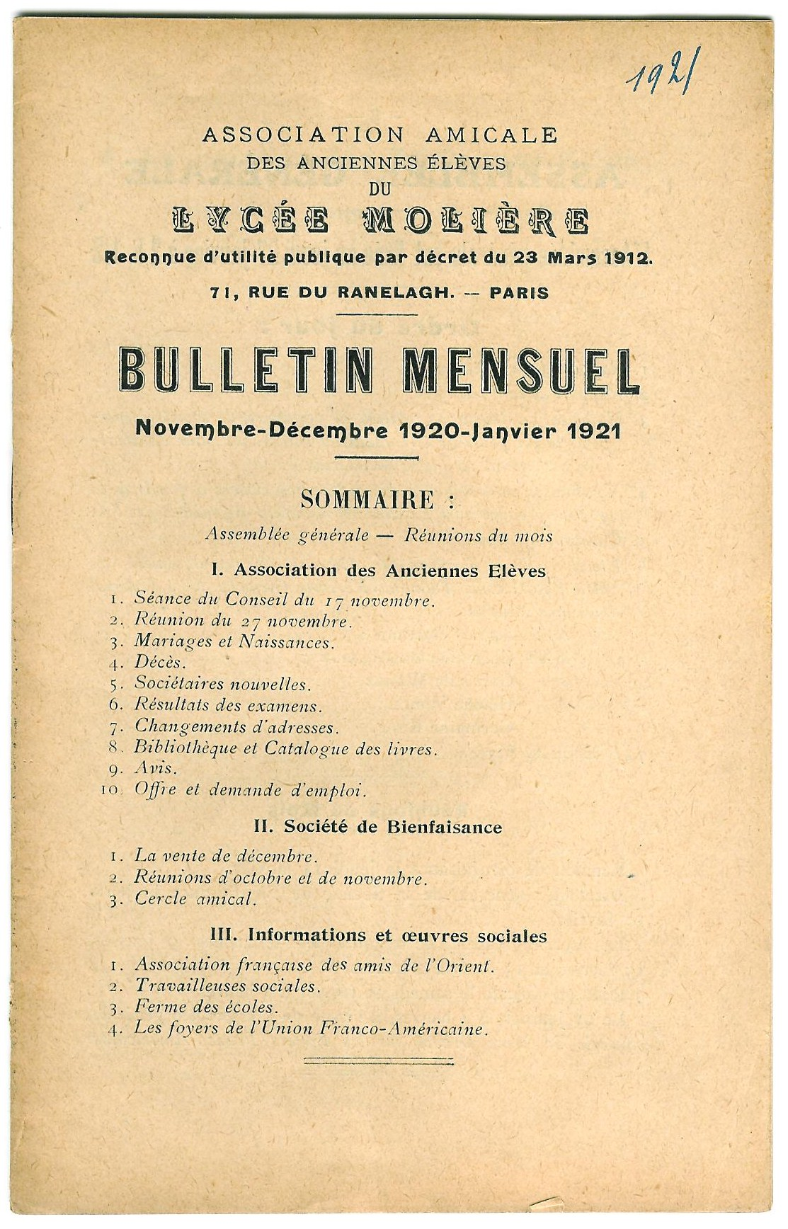 Première page du bulletin de l'association des anciennes élèves du lycée Molière (Paris)